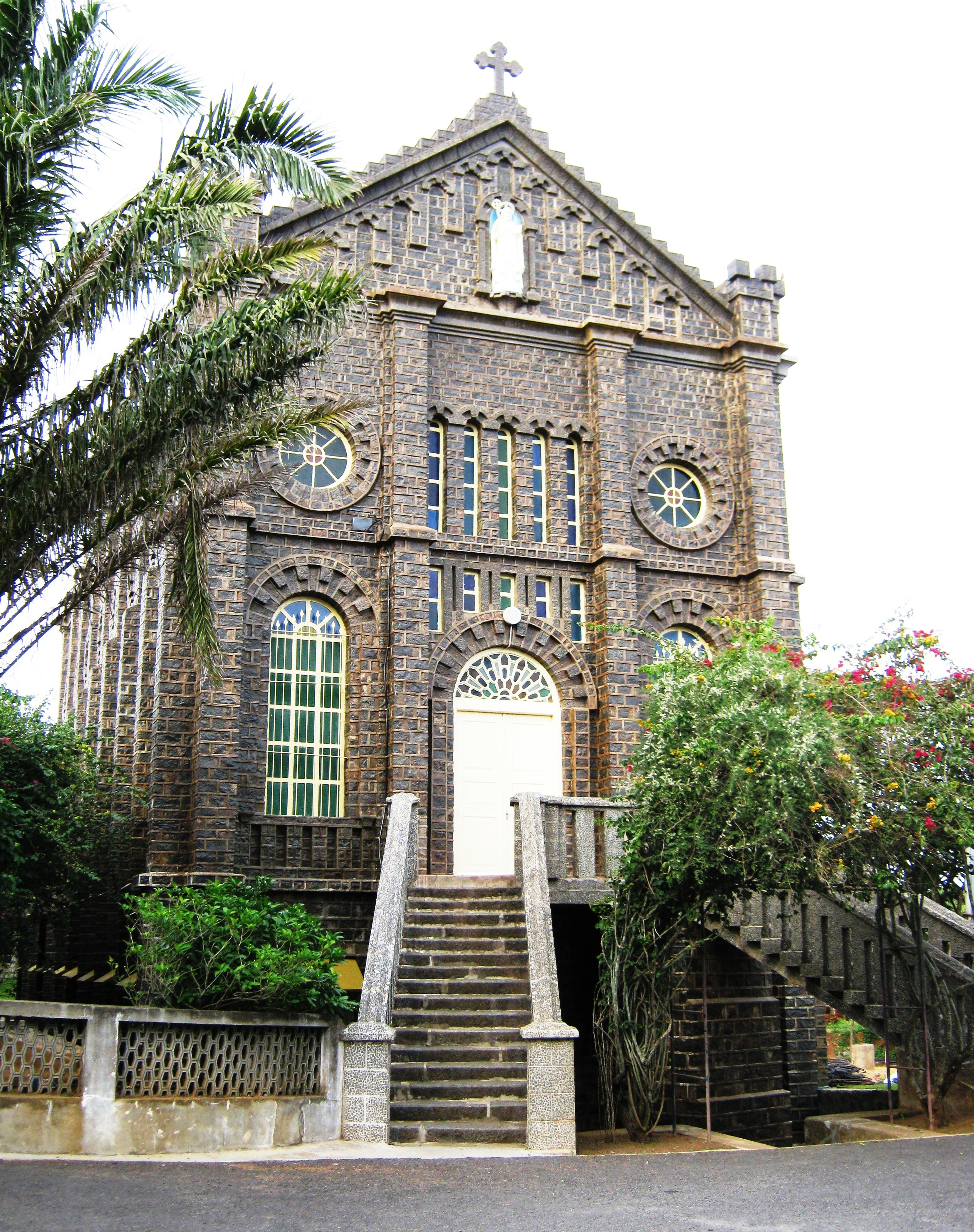 ST. LOUIS MONTFORT SCHOOL CHURCH, Yercaud, Salem